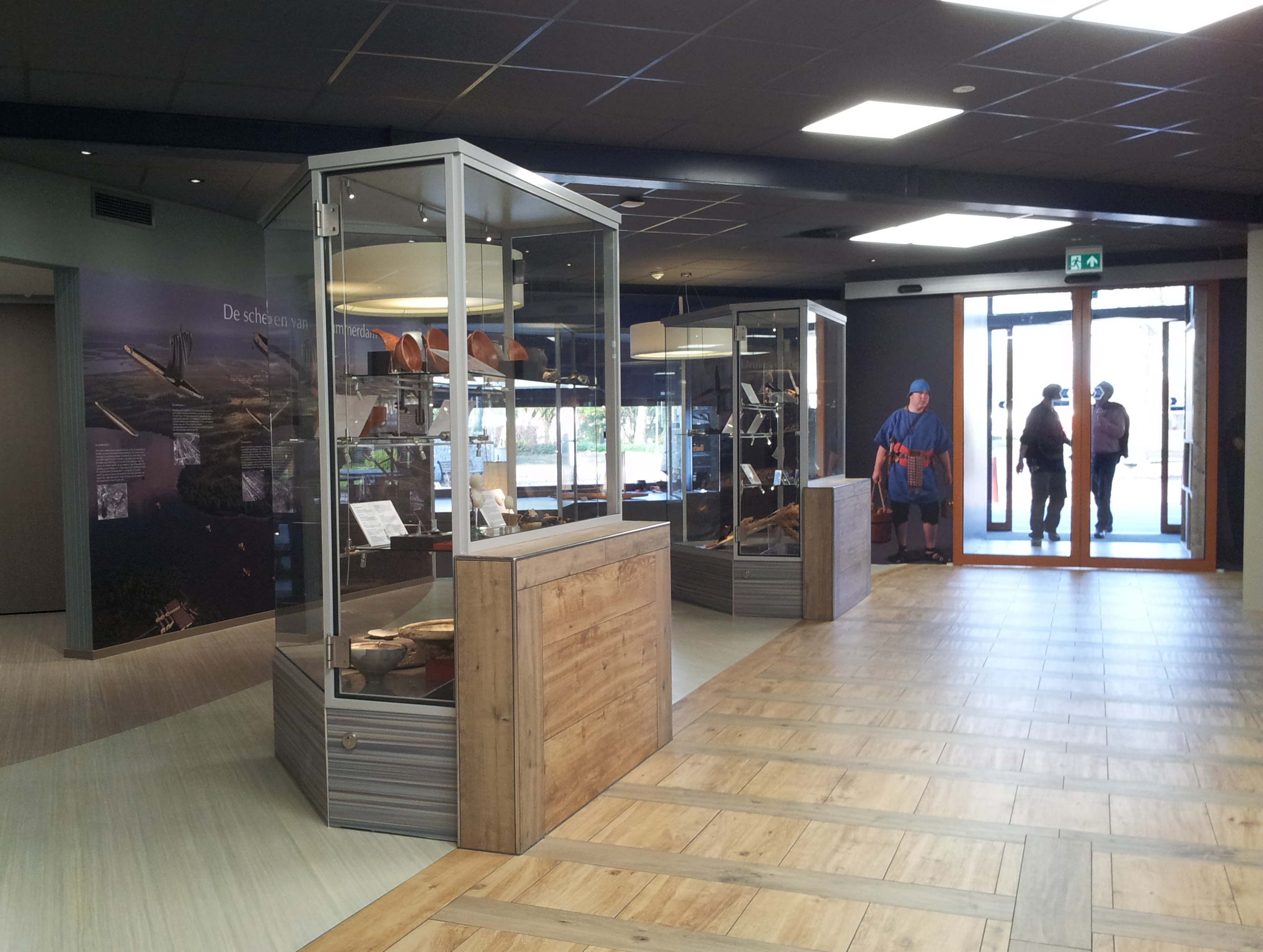 Limesbezoekerscentrum Nigrvm Pvllvm in Zwammerdam. Vaste expositie met vondsten van het castellum en informatie over de Romeinse schepen van Zwammerdam.